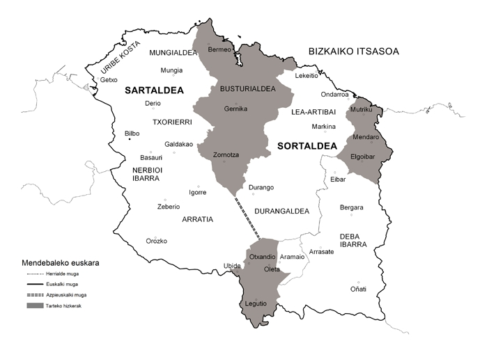 Mendebaleko euskararen mapa (Koldo Zuazo, 2015)